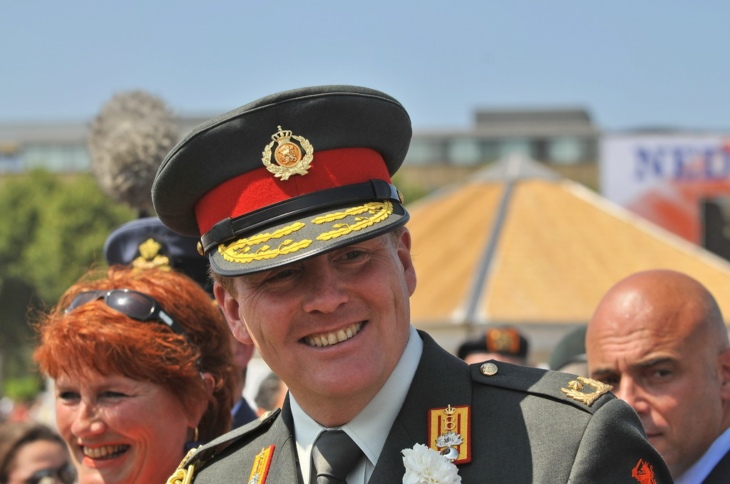 Prins Willem Alexander in het uniform van inspecteur-generaal.